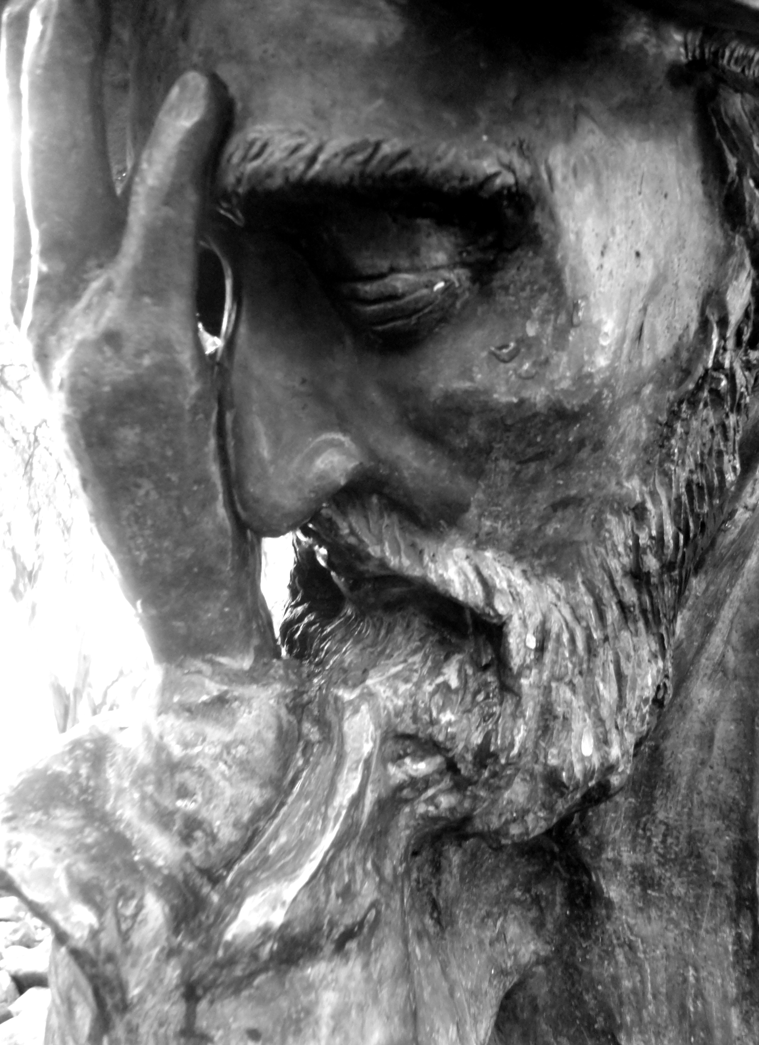 El Lamento de Hernán Cortés